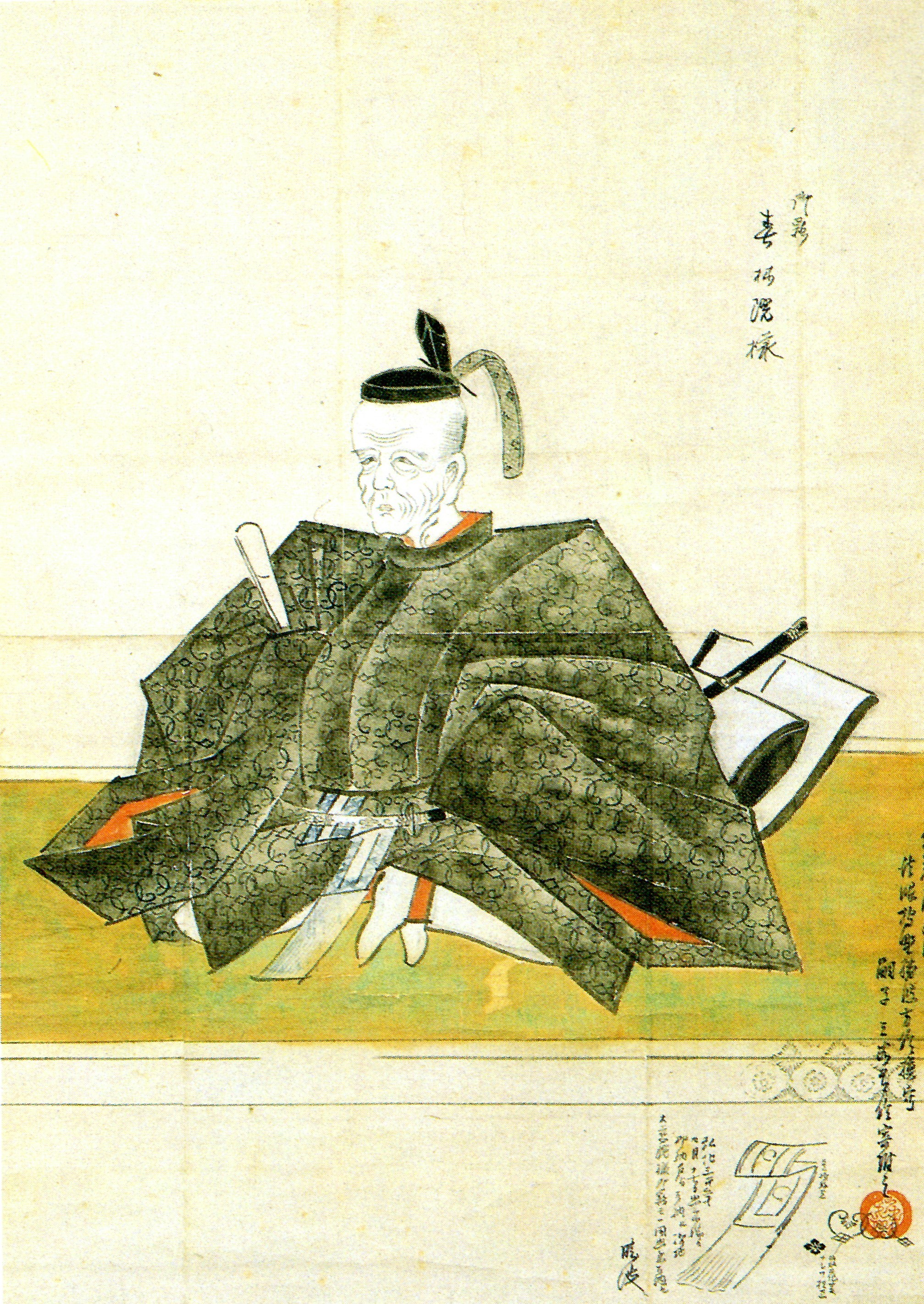 有馬豊氏の肖像。